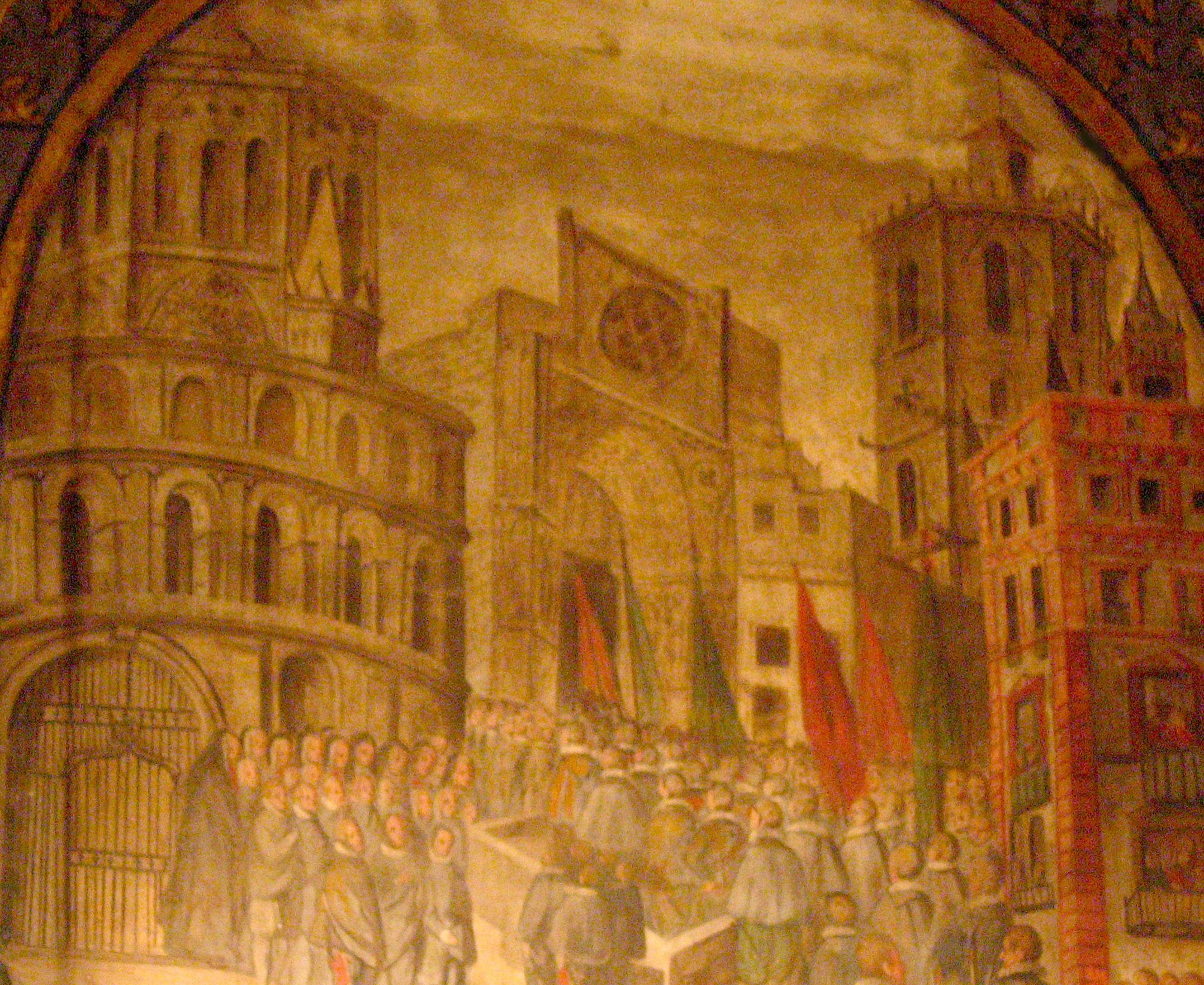 Pintura que mostra l'aspecte de la Seu de Valencia durant el segle XVII, d'acord amb una pintura mural que hi ha a una capella de l'església del Patriarca (o del Corpus Christi de València). Representa un processó